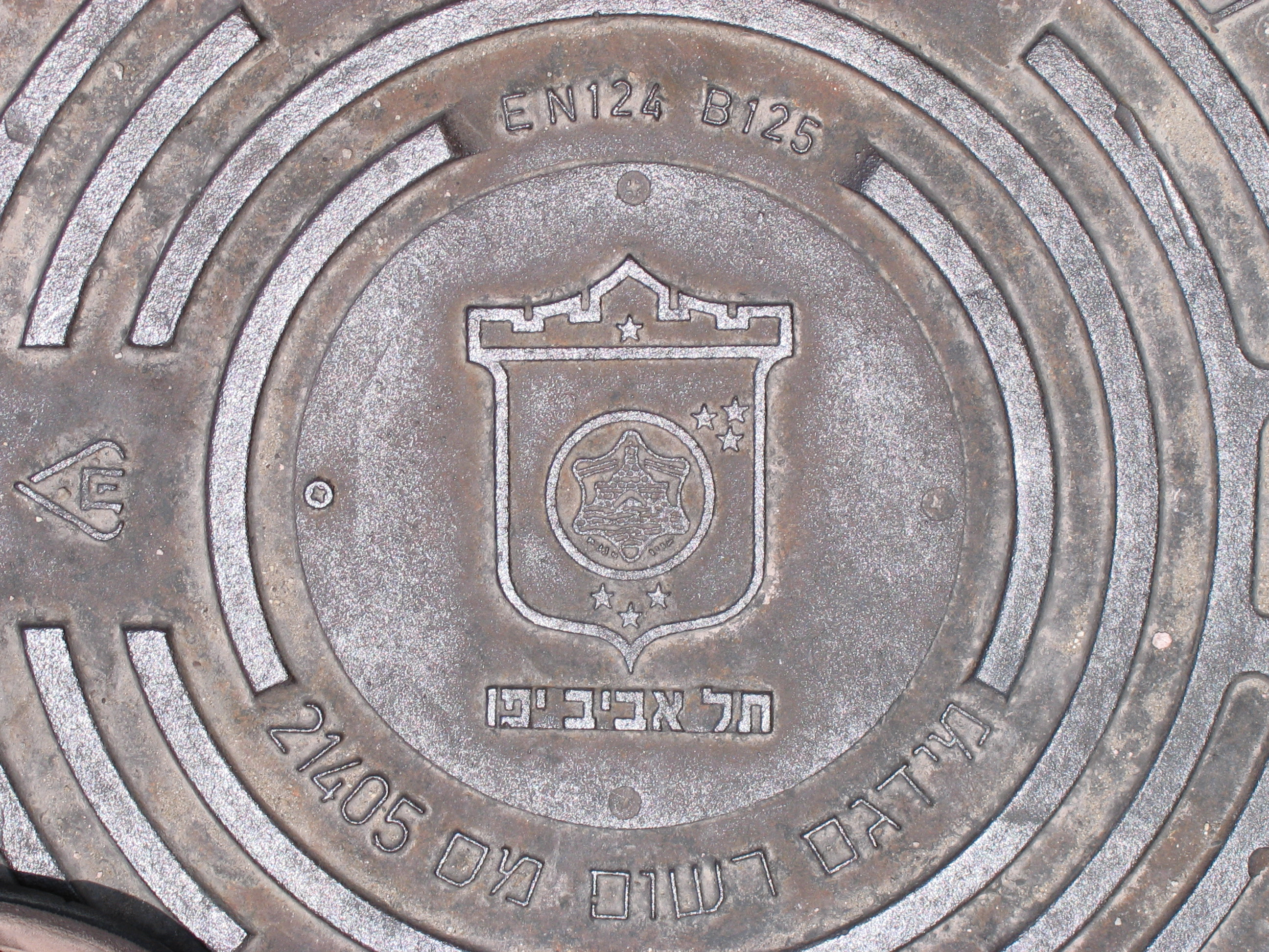 Israel2010 014